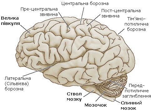 Будова головного мозку